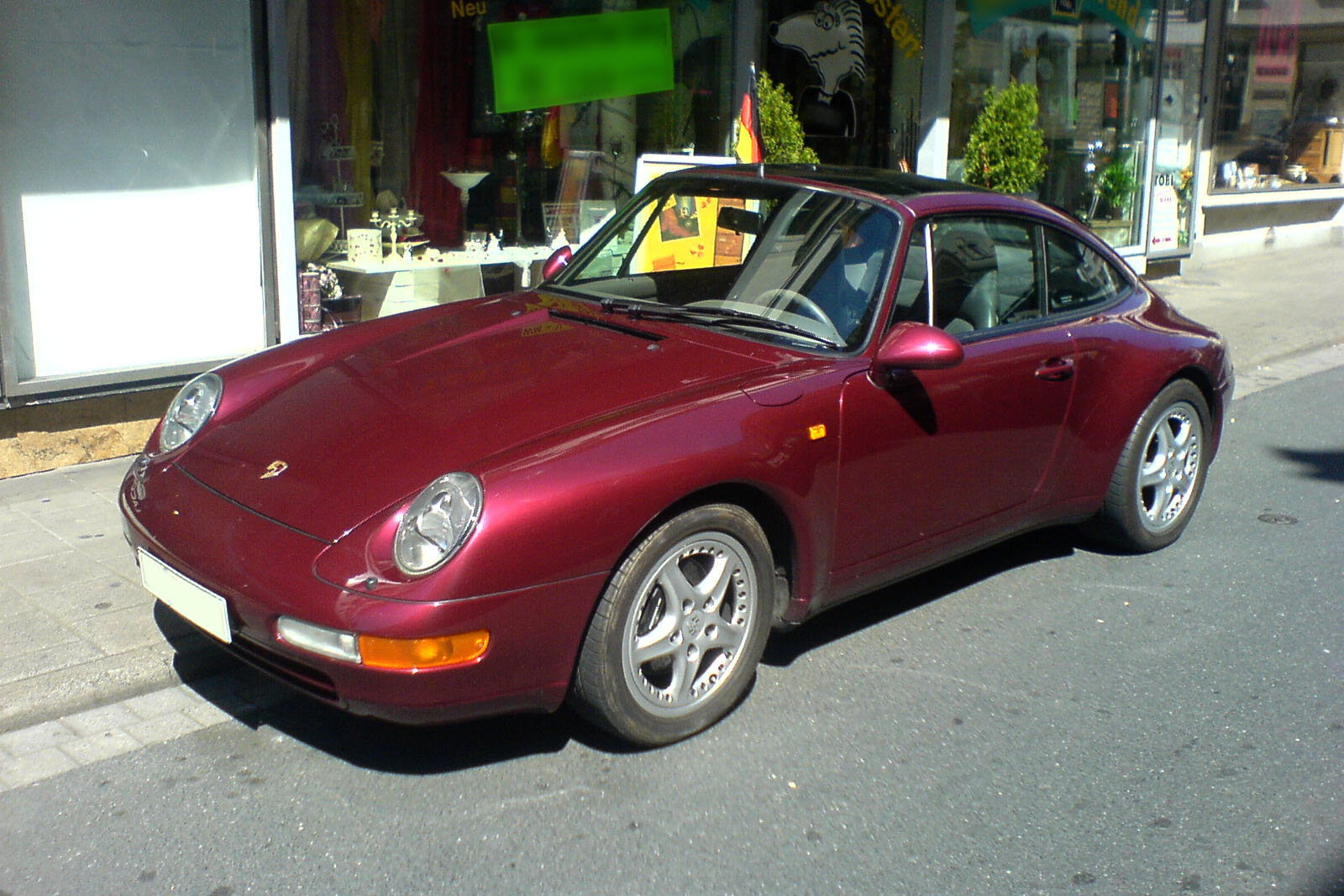 Porsche 993 targa